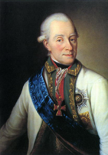 российский флотоводец, мореплаватель, адмирал В. Я. Чичагов (1726—1809)